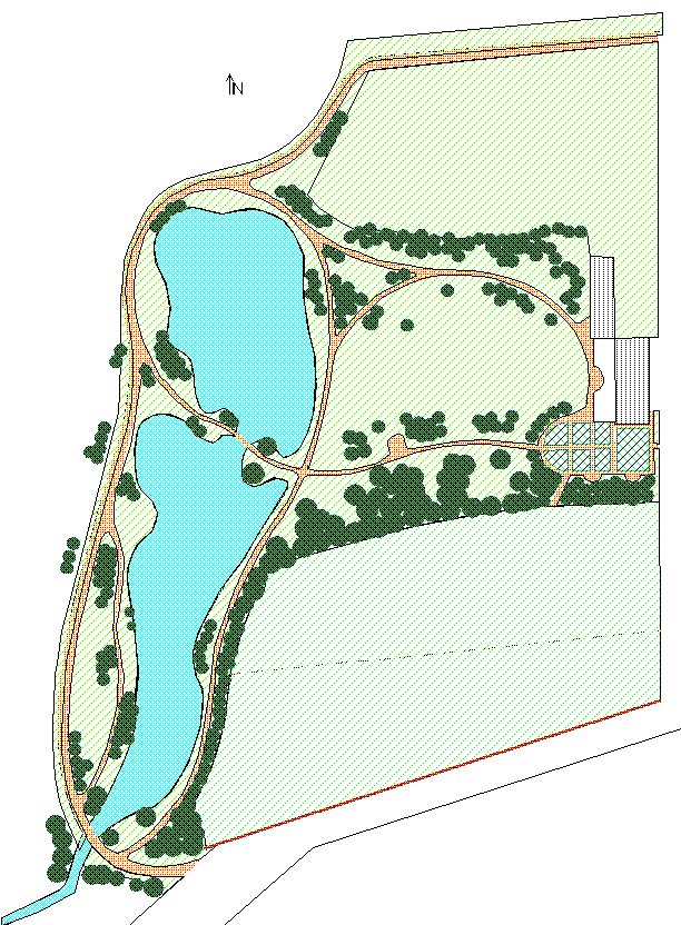 Farbige Skizze des Kartlower Parks nach Vorlage: Durchzeichnung des Parkplanes für Kartlow, 1840, G. Kober In: Petra Gersonde: Schloß und Park Kartlow, Regionalmuseum Neubrandenburg